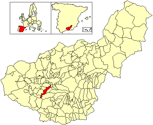 Situación del término municipal de Alhendín respecto a la provincia de Granada, en España.